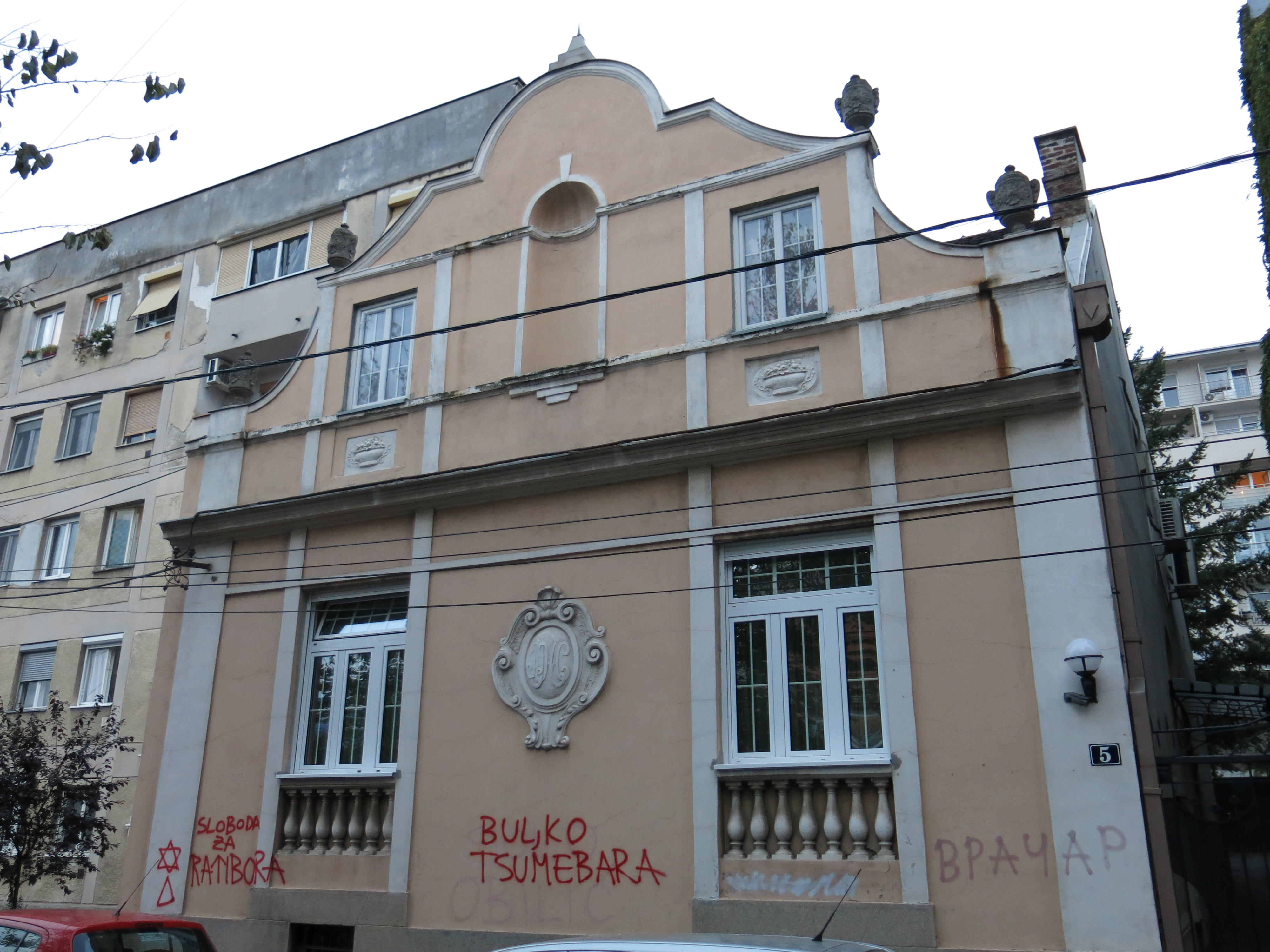 Кућа Поповића